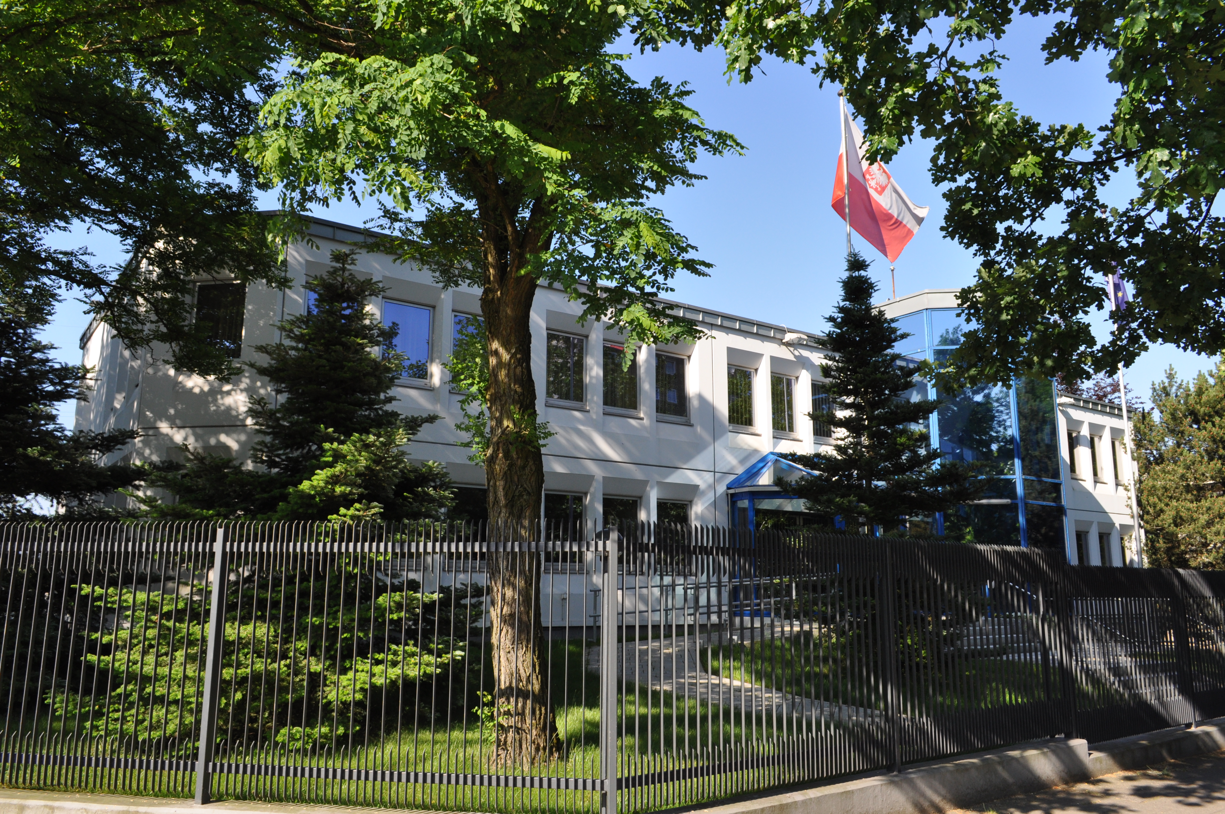 Generalkonsulat der Republik Polen an der Gründgensstraße 20 in Hamburg-Steilshoop.